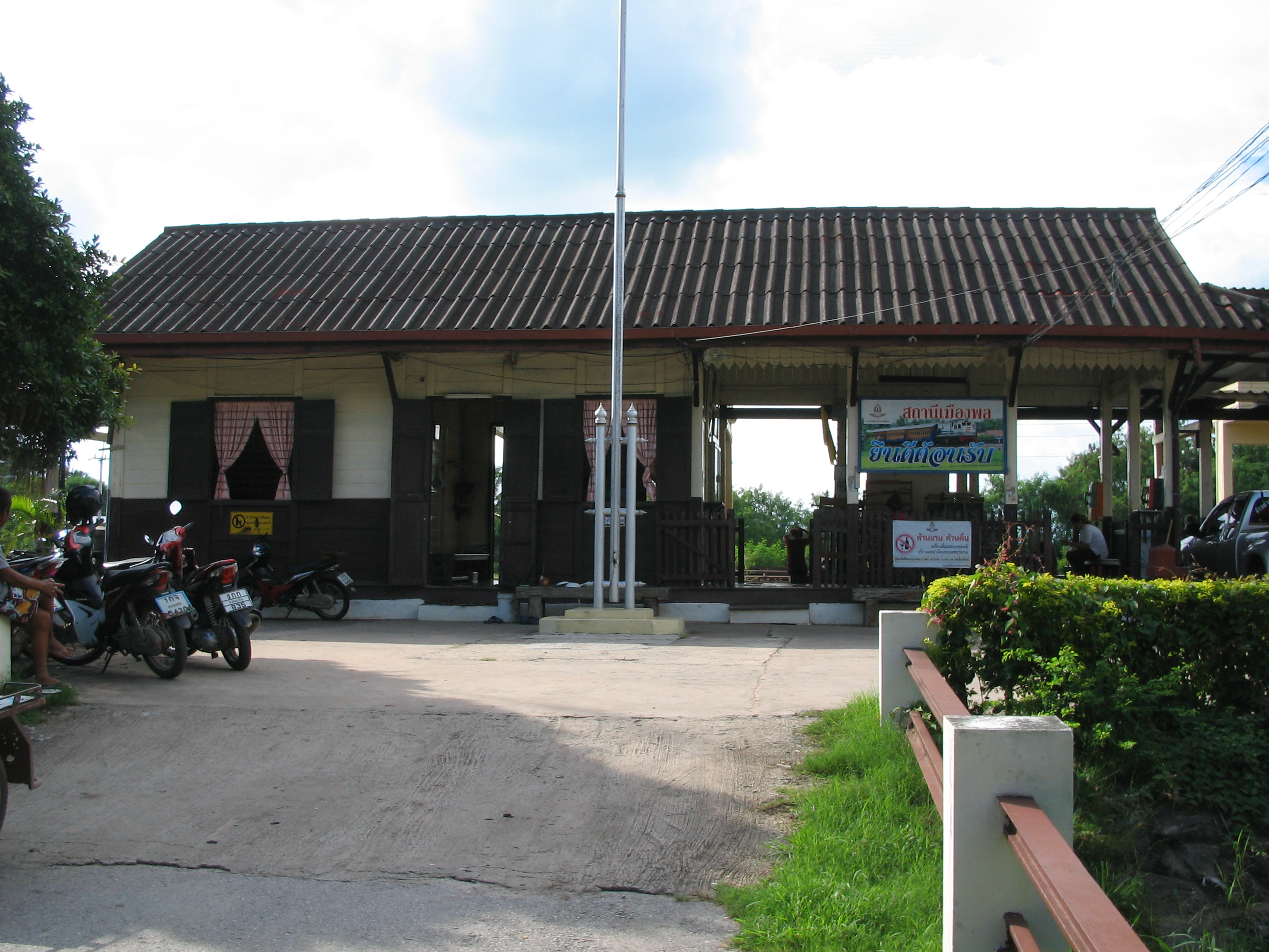 ムアンポン駅